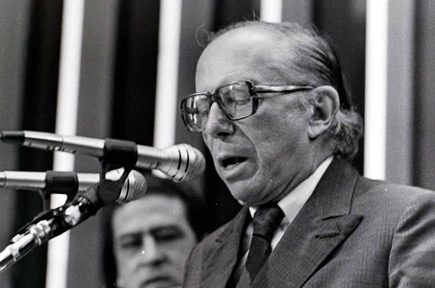 Senador Roberto Campos discursa na Assembleia Nacional Constituinte